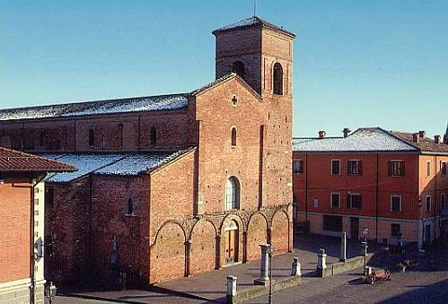 La Concattedrale di San Vicinio di Sarsina. Gennaio 2009.